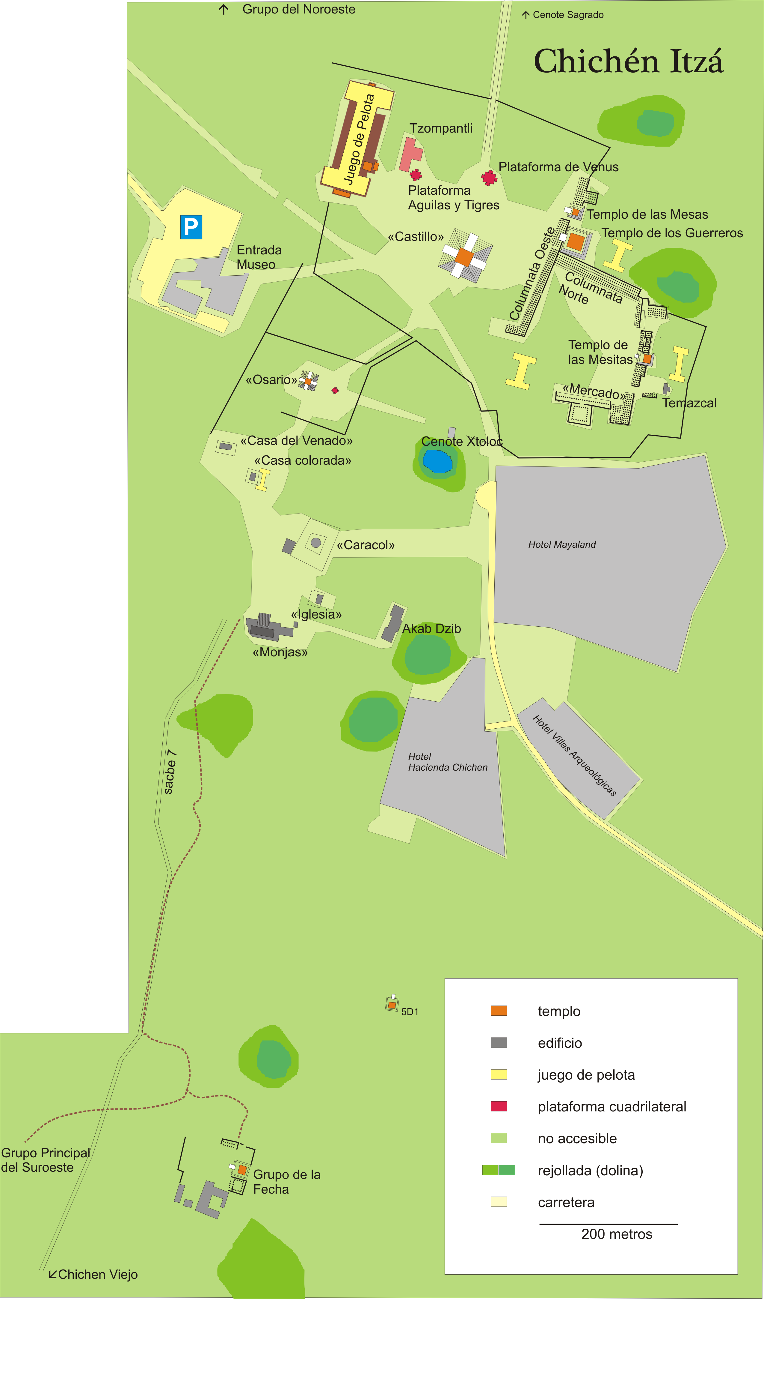 Chichén Itzá, Yucatán, México: mapa del área central